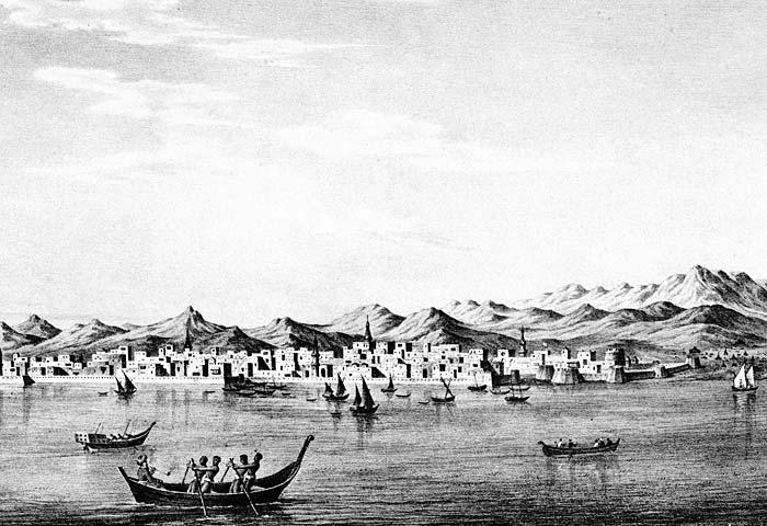 Debal, mid-1500s